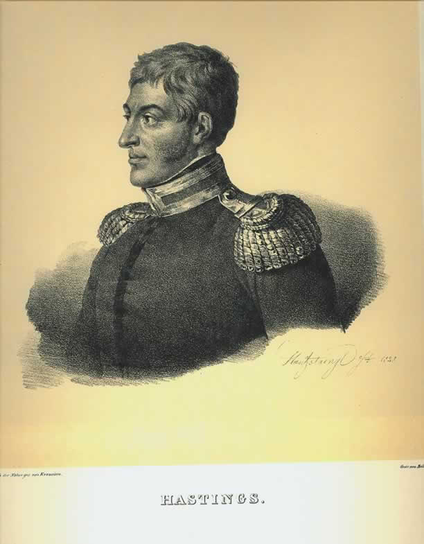 Aπό: Bildnisse ausgezeichneter Griechen und Philhellenen nebst einigen Ansichten und Trachten. Nach der Natur gezeichnet und herausgegeben von Karl Krazeisen. Munchen 1831